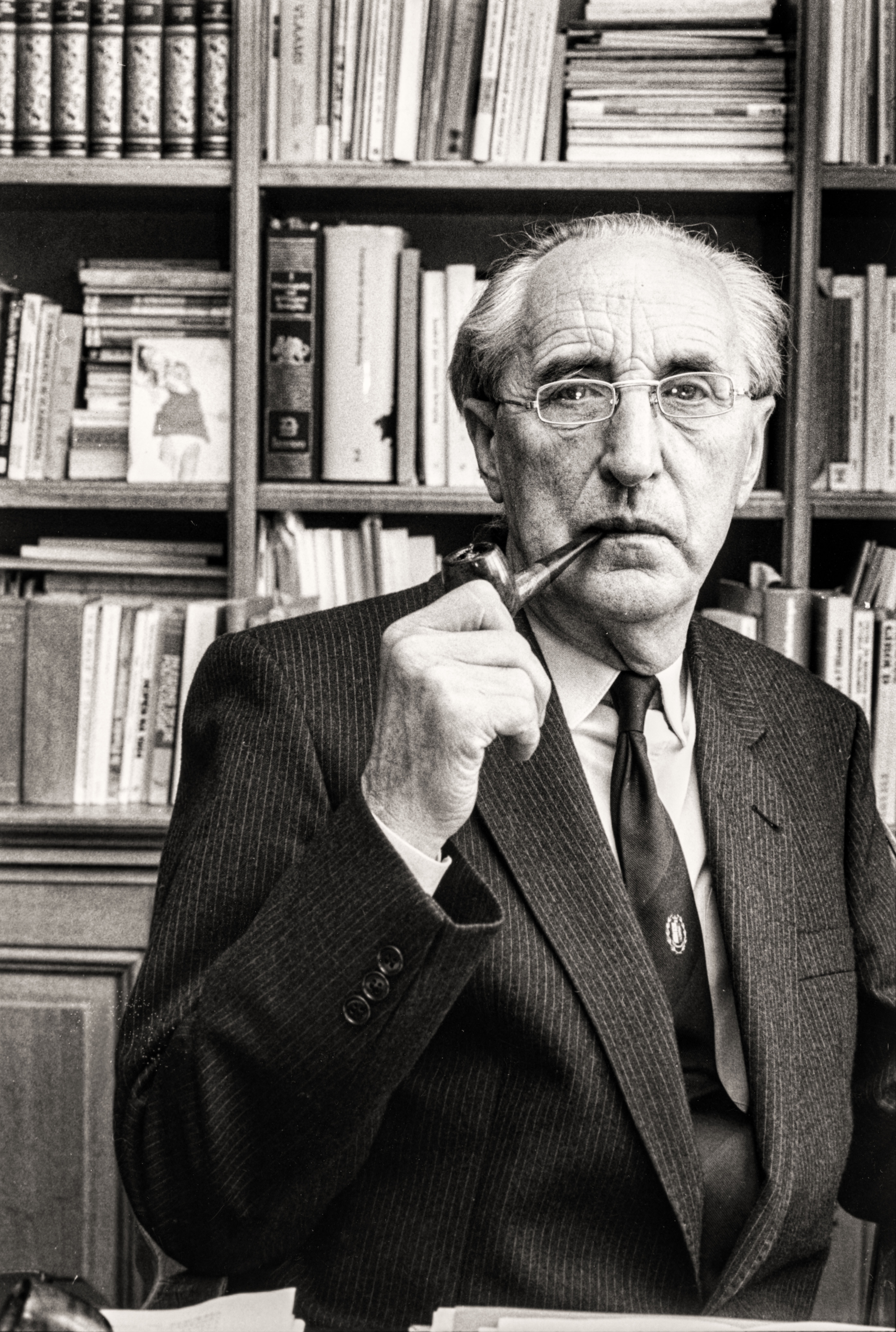 Jan Verroken, Belgisch politicus. Hij was burgemeester van Oudenaarde, fractievoorzitter in de Kamer voor de CVP en Europees volksvertegenwoordiger.